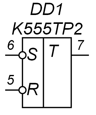 RS-триггер К555ТР2 (один из черырёх триггеров в корпусе)